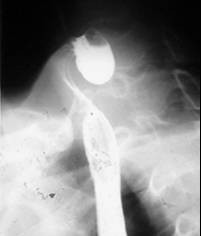 Radiological stage III Zenker's diverticulum.